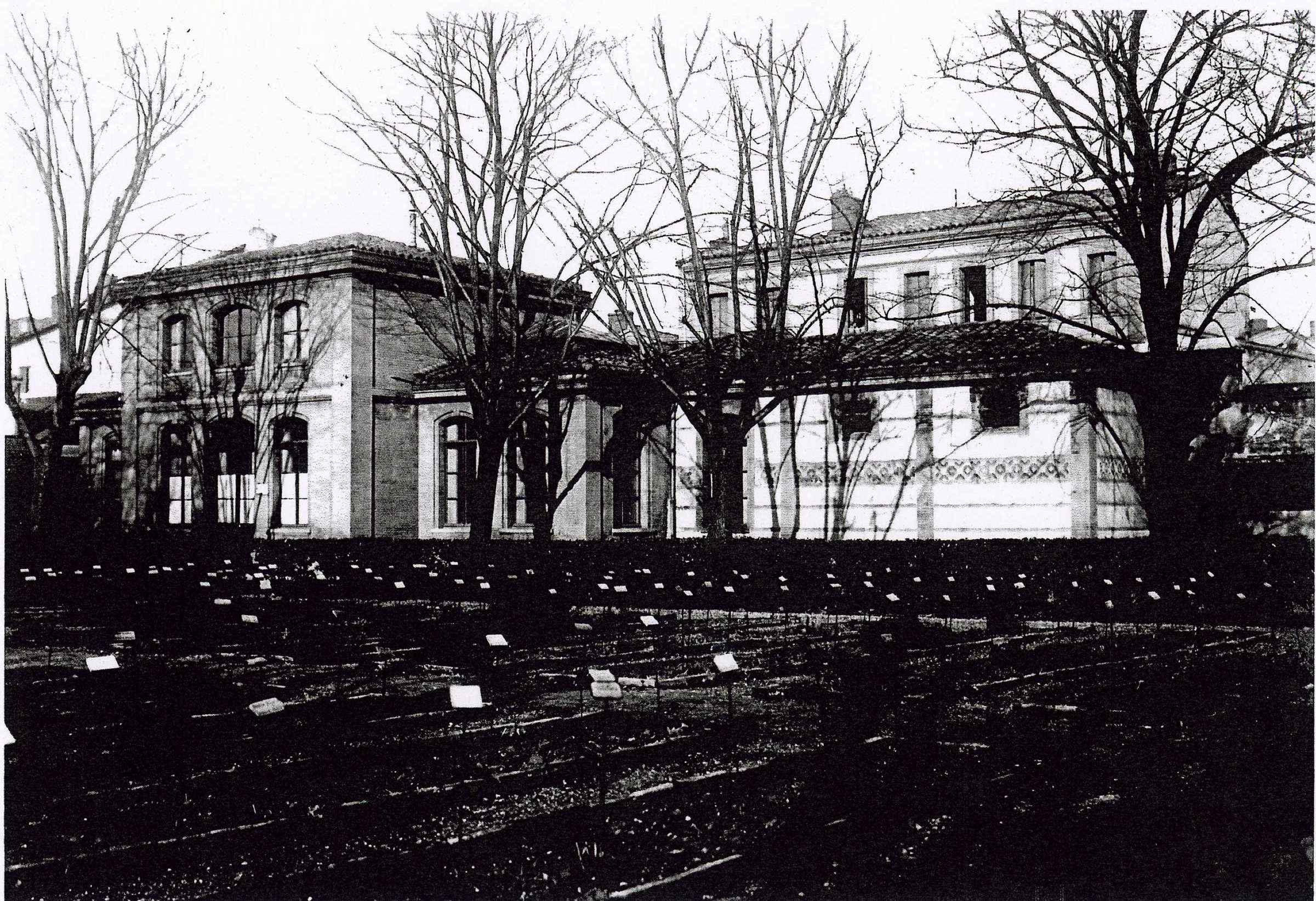 Le bâtiment d'enseignement et de recherche en microbiologie et maladies contagieuses de l'ancienne École nationale vétérinaire de Toulouse. Ce bâtiment était situé à un angle du quadrilatère occupé par l'ENVT, et à un angle du jardin botanique.